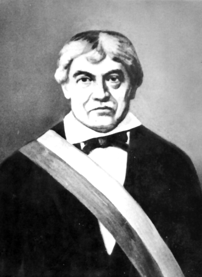 Justo Figuerola (1771 - 1854), político y magistrado peruano. Presidente interino del Perú en dos ocasiones: durante unos días en 1843 y dos meses en 1844.